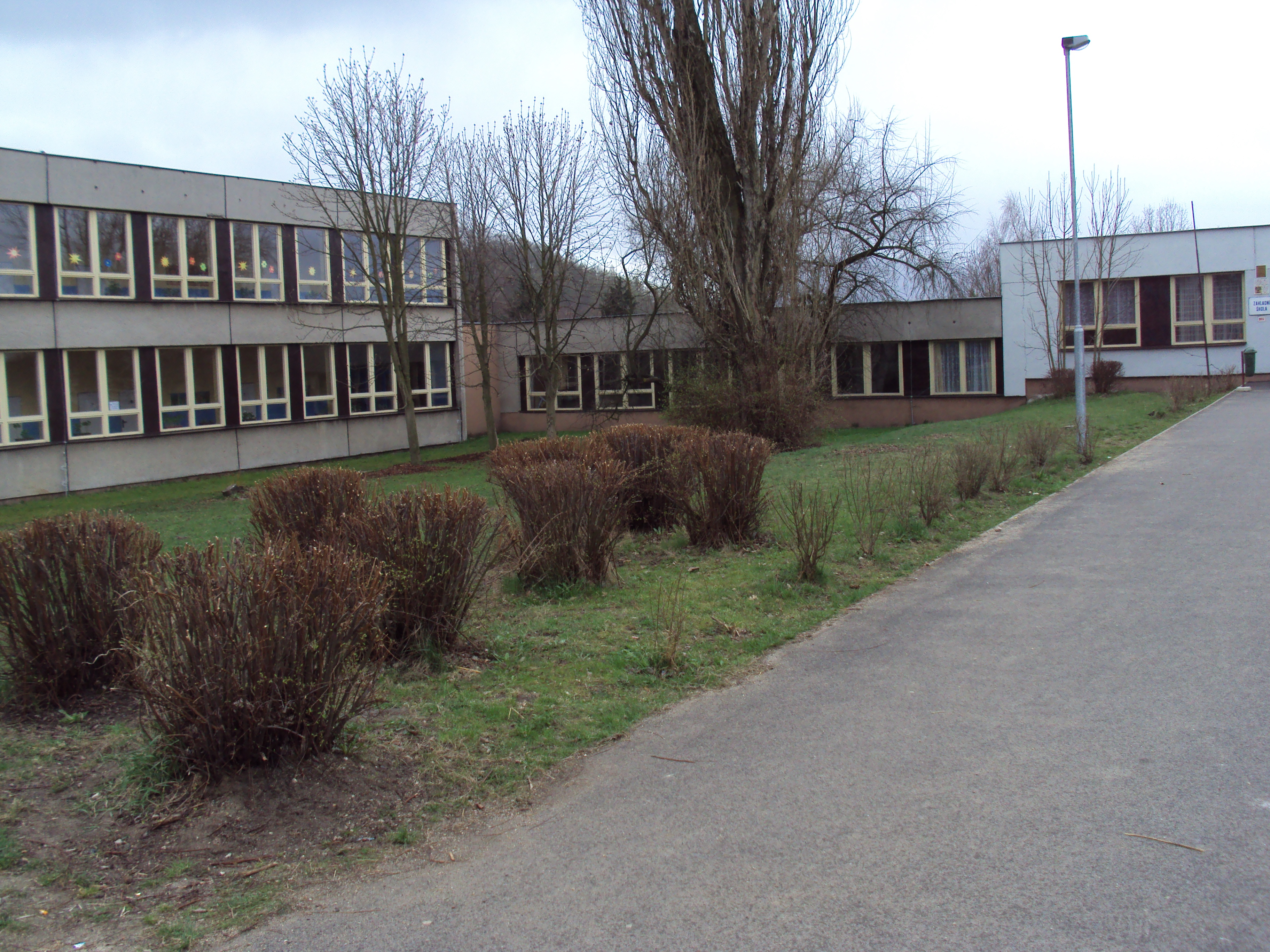 Základní škola Jižní 1903, příchod, nová nízká stavba